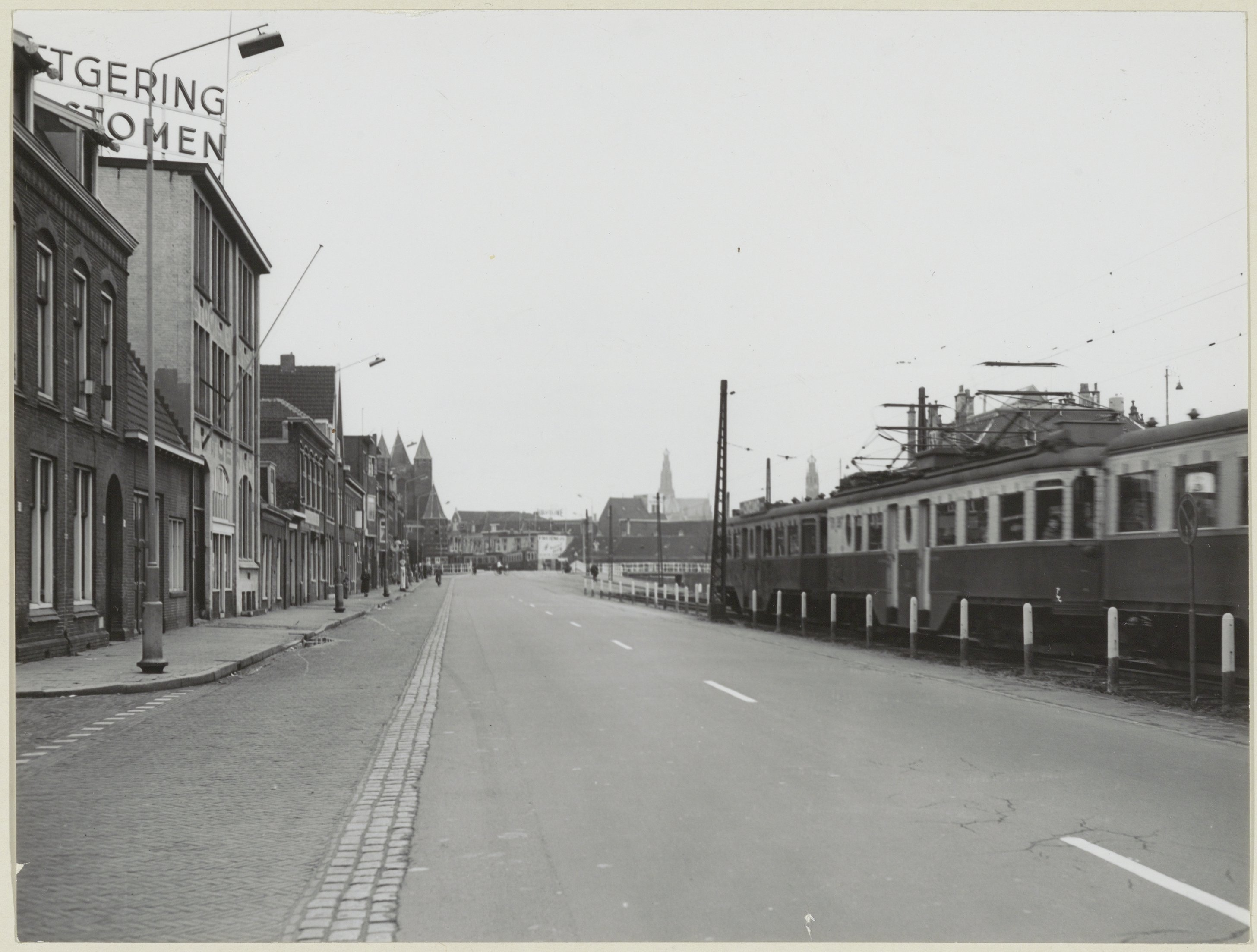 CollectieCollectie Fotoburo de BoerInventarisnummerNL-HlmNHA_54004362BeschrijvingAmsterdamsevaart nabij de Poortstraat, ziende naar het westen. Rechts de Boedapester tram, links achter de Amsterdamse Poort.FotonummerNL-HlmNHA_1478_3452DocumenttypeTopografische prenten, tekeningen en foto'sVervaardigerBoer, Cees de (1918-1985) Soort vervaardigerFotograaf LandNederland ProvincieNoord-Holland GemeenteHaarlem PlaatsHaarlem StraatAmsterdamsevaart GeografischAmsterdamsebuurt Begindatum1950Einddatum1950TechniekFoto Trefwoordenstraatgezichten